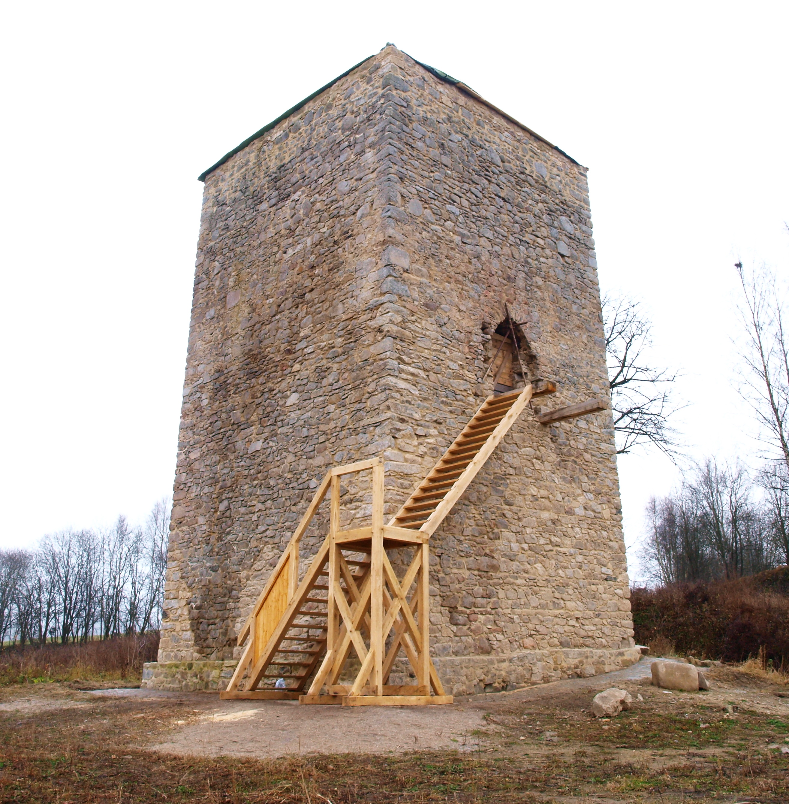 Bývala tvrz v obci Tichá na Kaplicku, Dolní Dvořiště